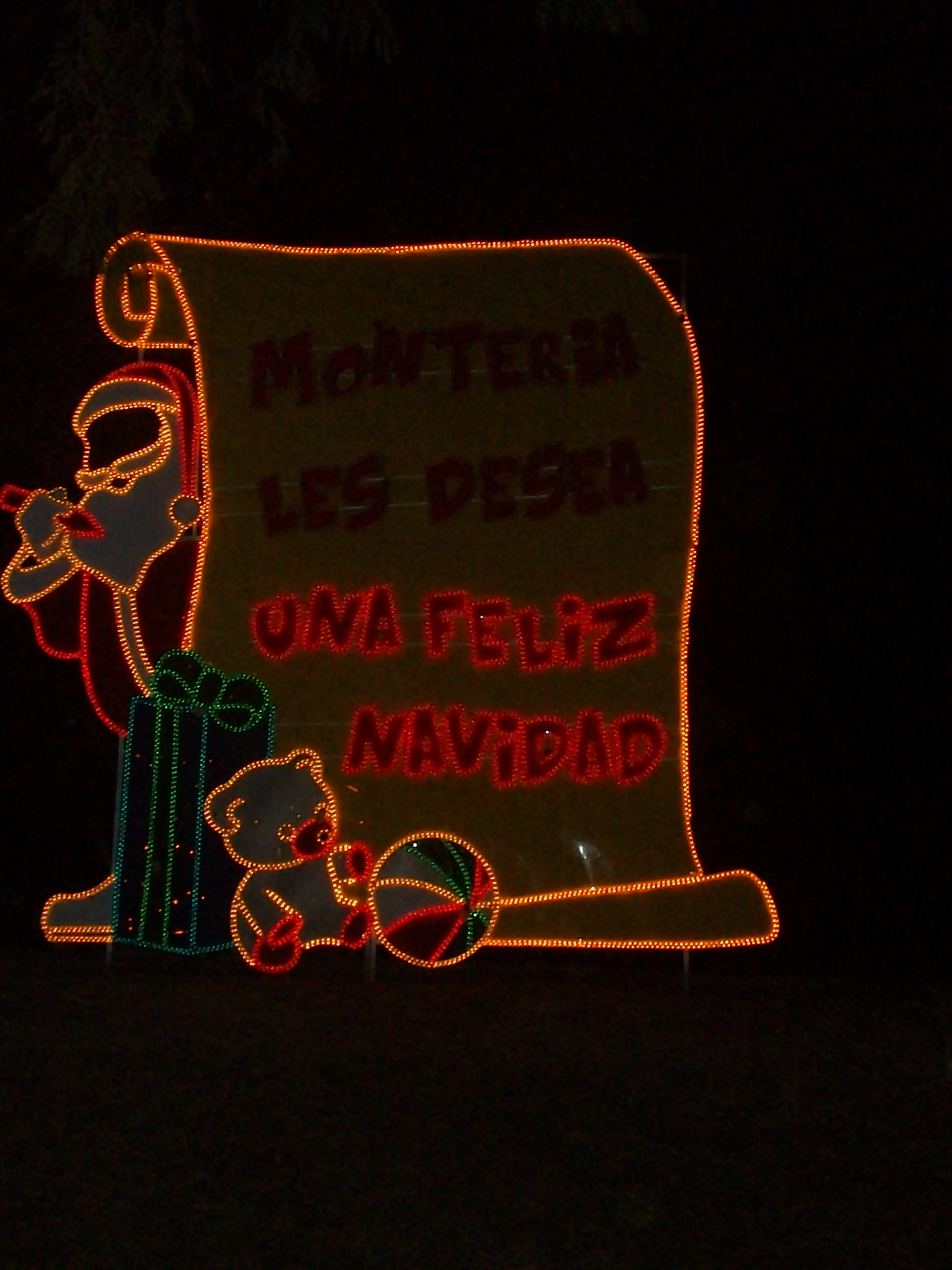 Ronda del sinú iluminada